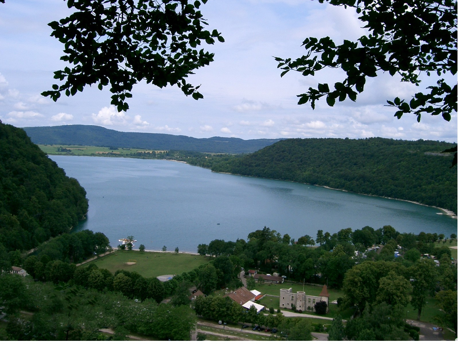 lac de Chalain depuis Fontenu -Jura France